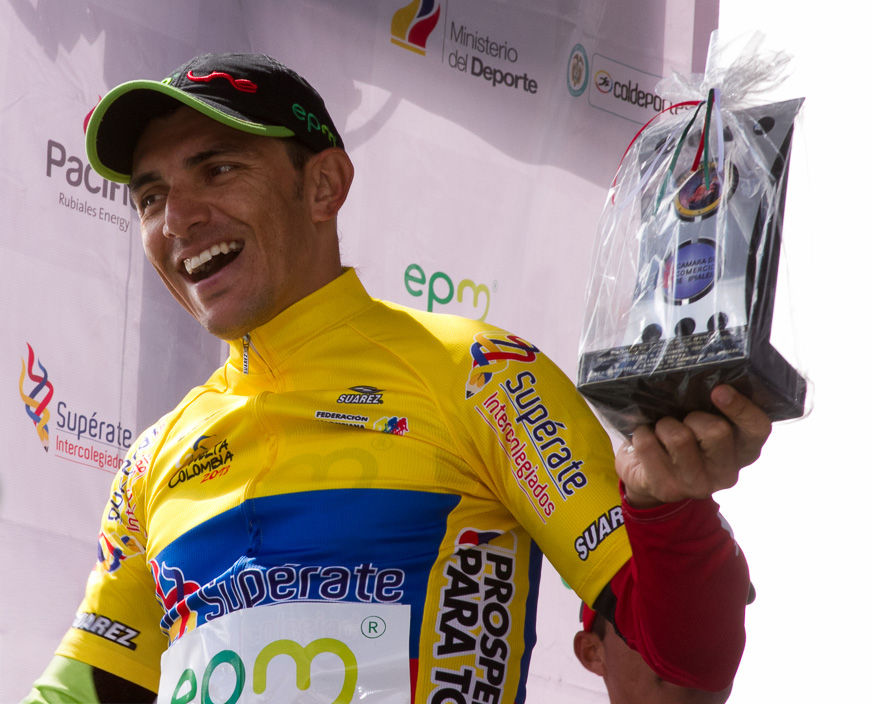 Stíber Ortiz2ª. Eta. Vuelta a Colombia 2013Ibarra - Ipiales 134KmLunes 10 de junio de 2013